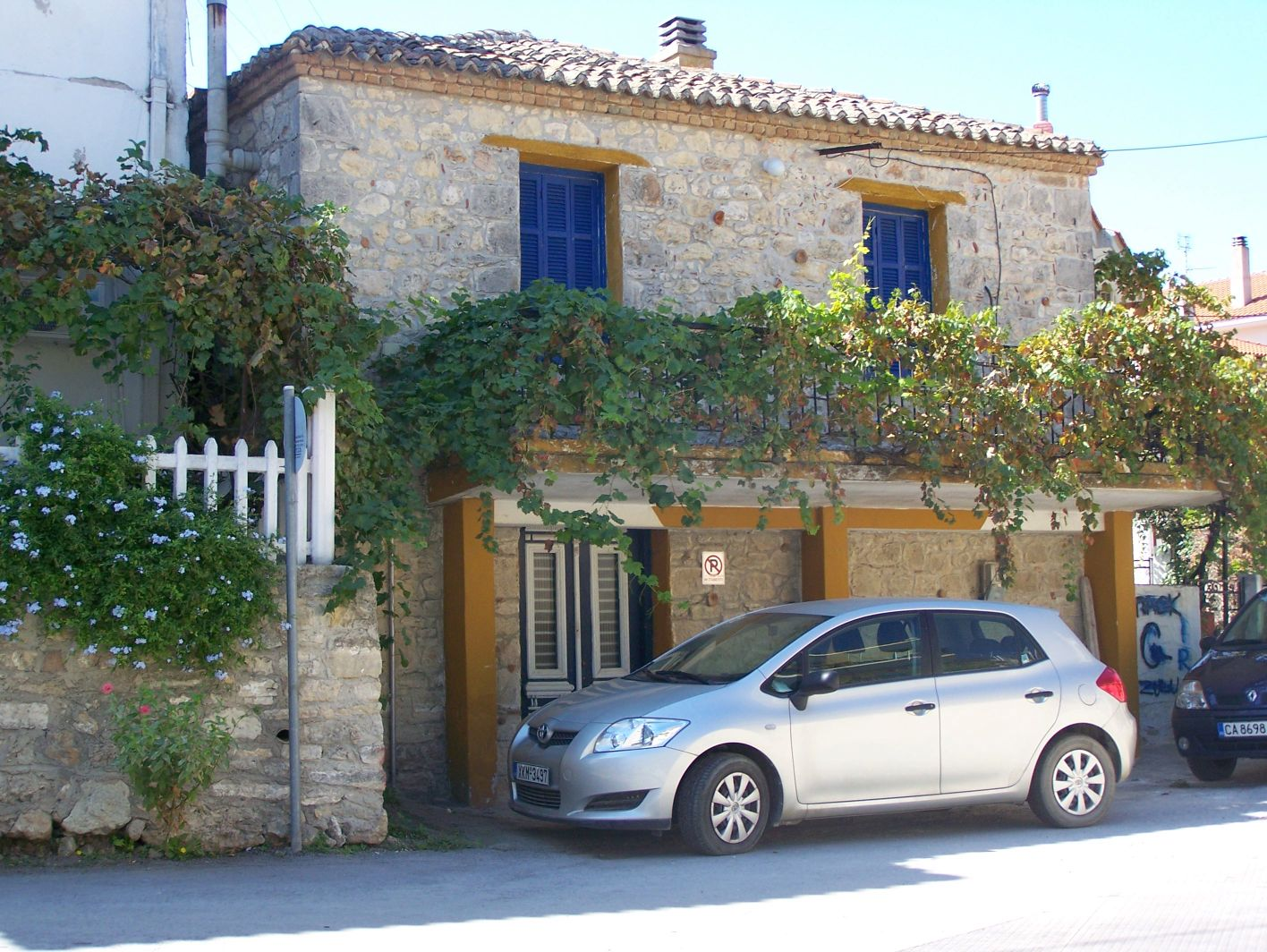 Traditionelles Haus in Afytos